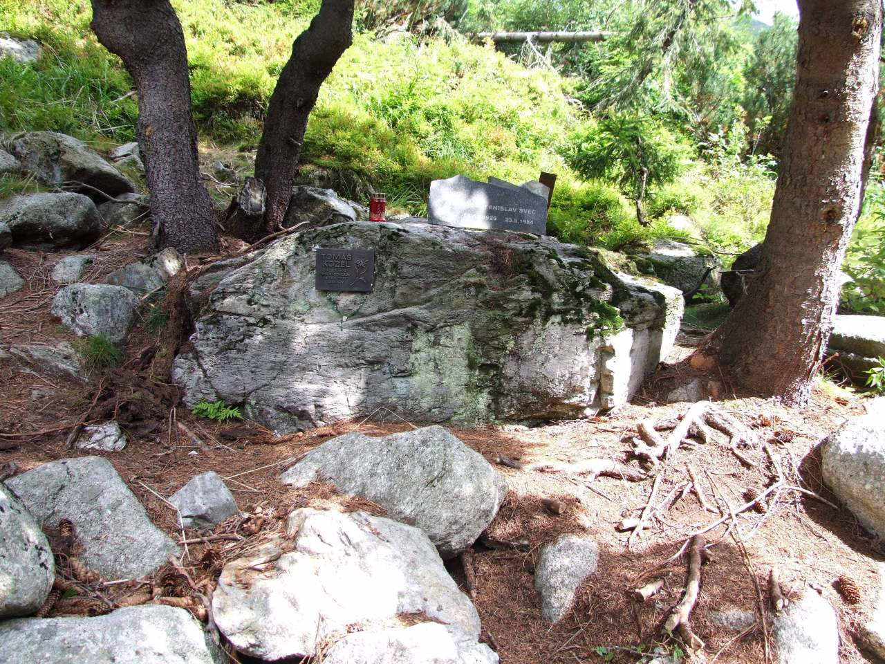 Symboliczny cmentarz ofiar Tatr Zachodnich przy Żarskim Schronisku